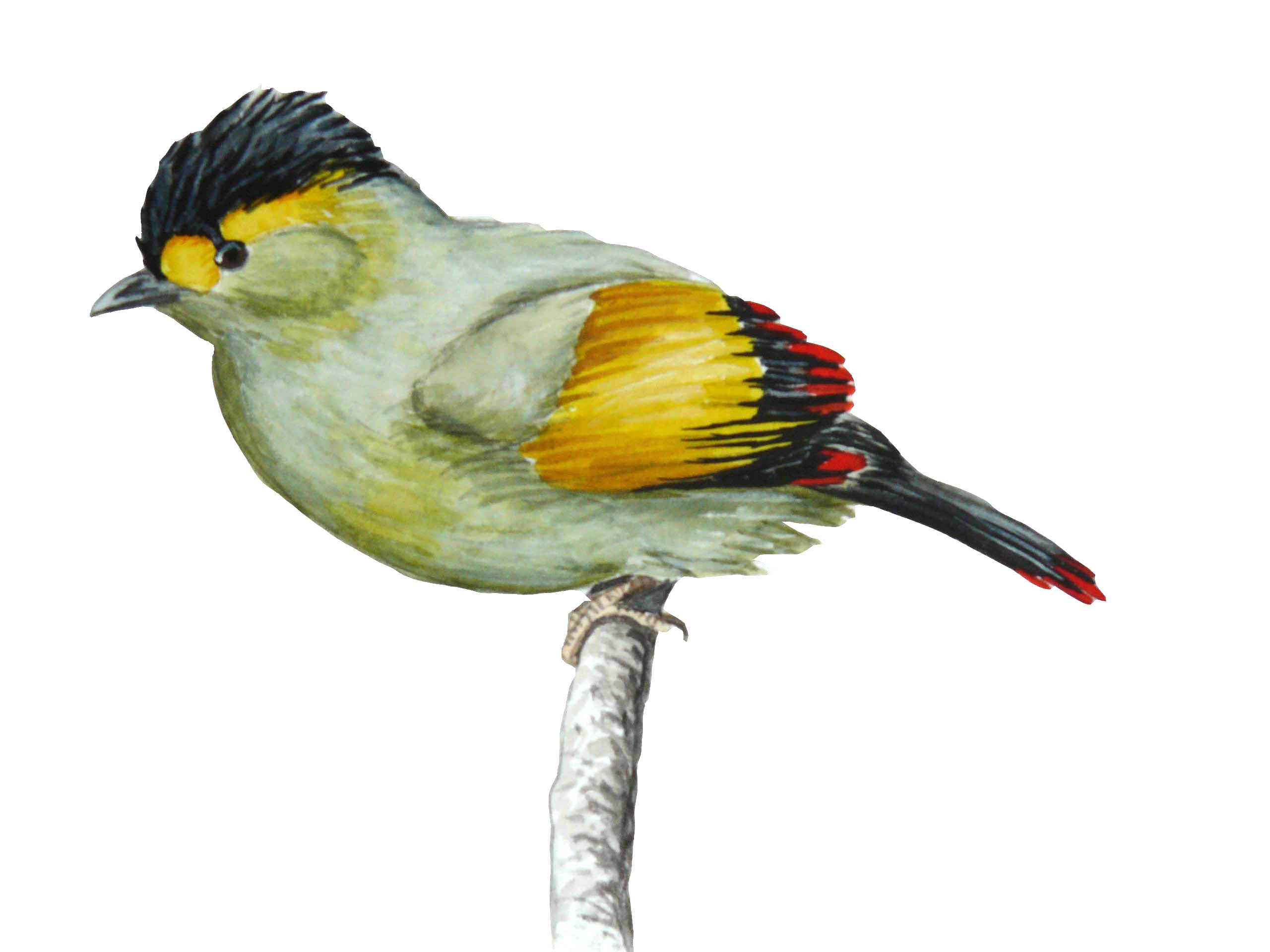 Bugun Liocichla bugunorum